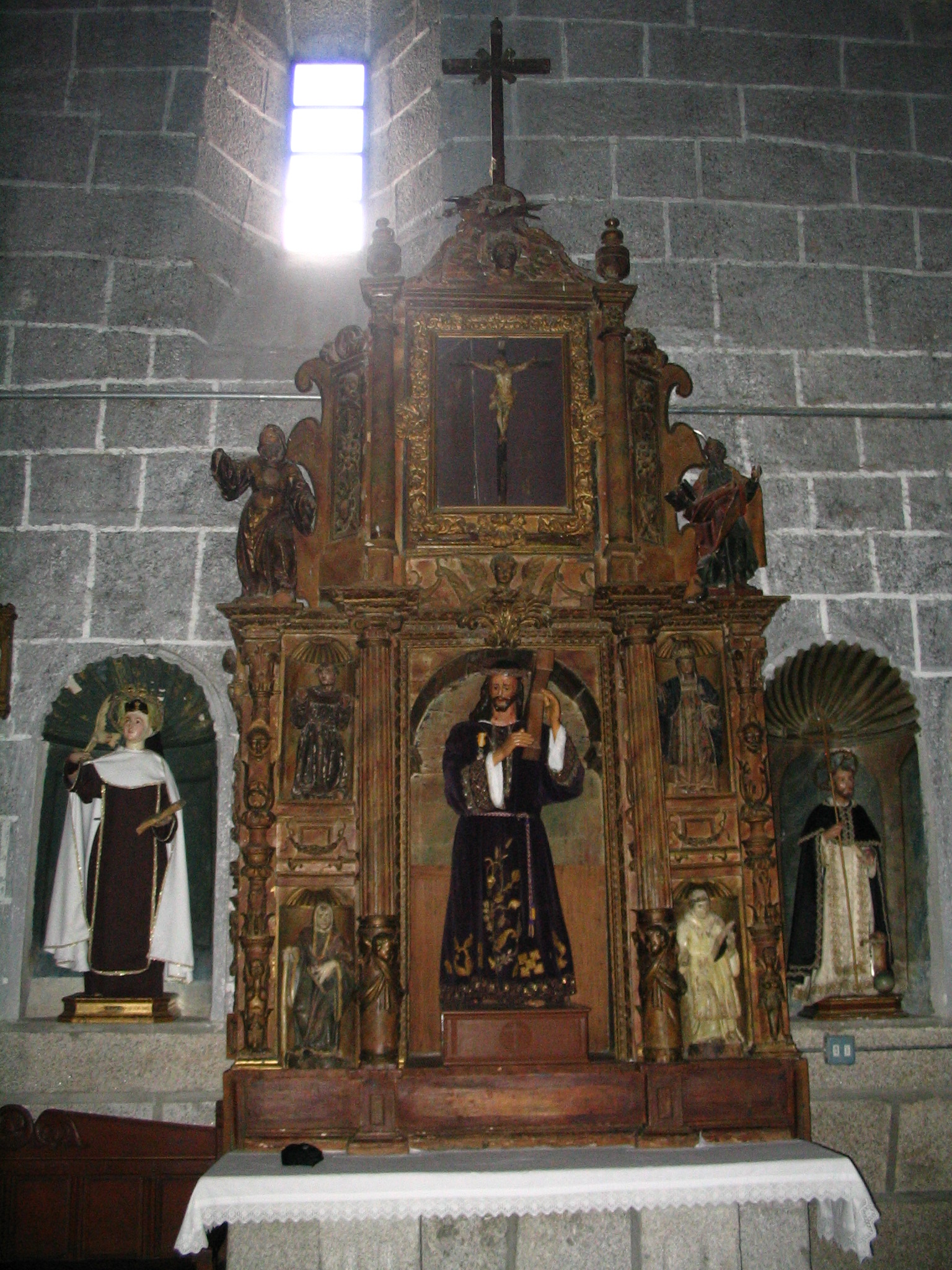 Retablo del Nazareno, Iglesia Ntra Sra del Castillo, Macotera